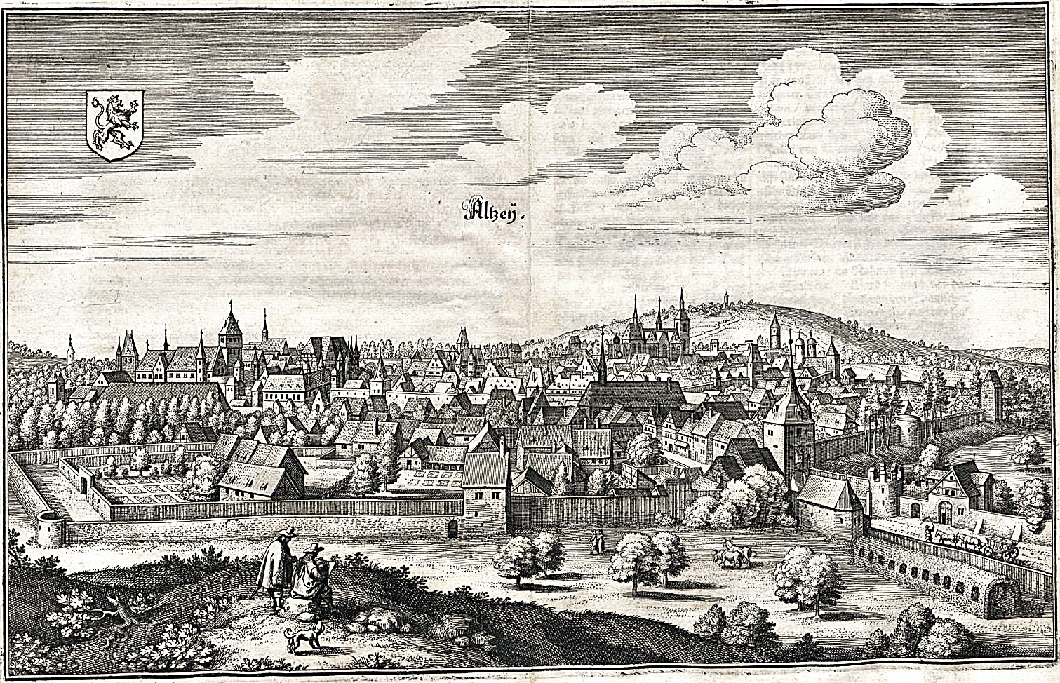 Alzey, Rheinland-Pfalz, Stich von Merian, 1645